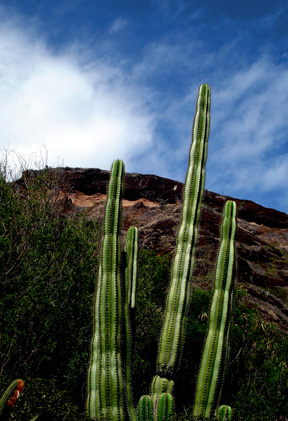 Koko Crater Botanical Garden, Oahu, Hawaii